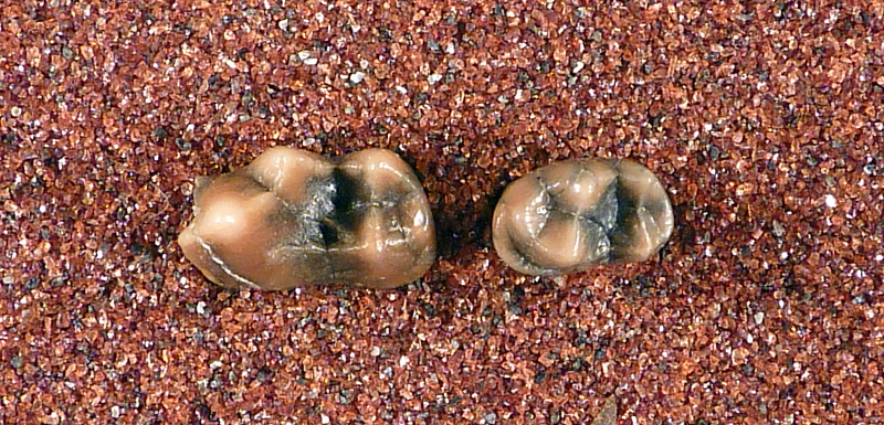 Tomarctus marylandica molars (M1 - M2)